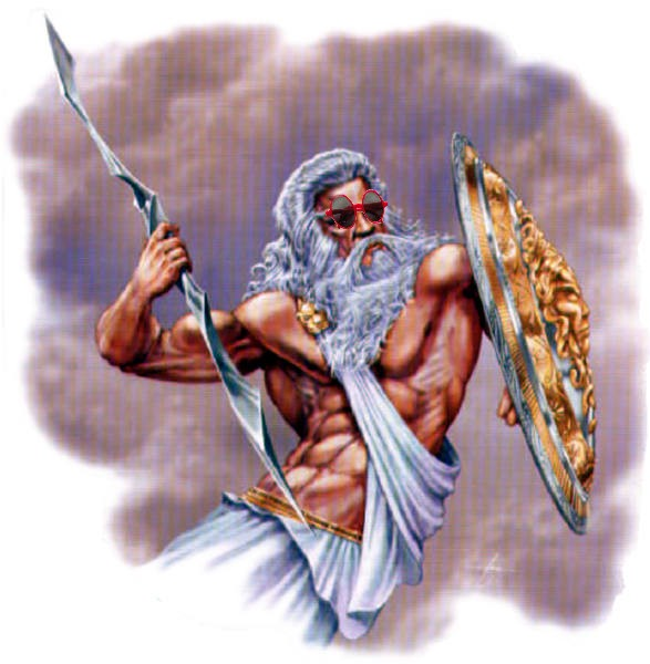 Jupiter aus Blähfeld-Opium